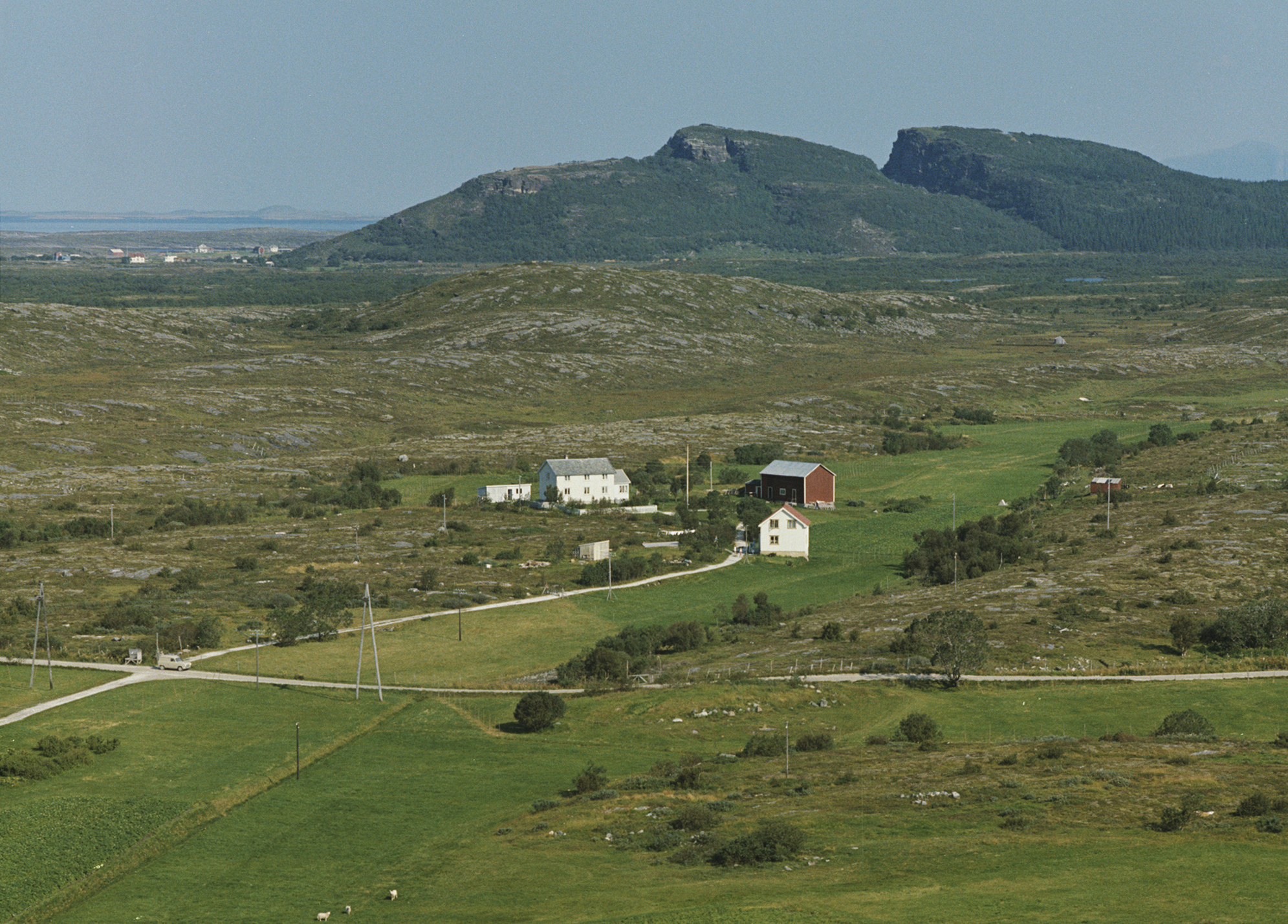 Våg & Dønnesfjellet, Dønna, Helgeland, Nordland, Norway